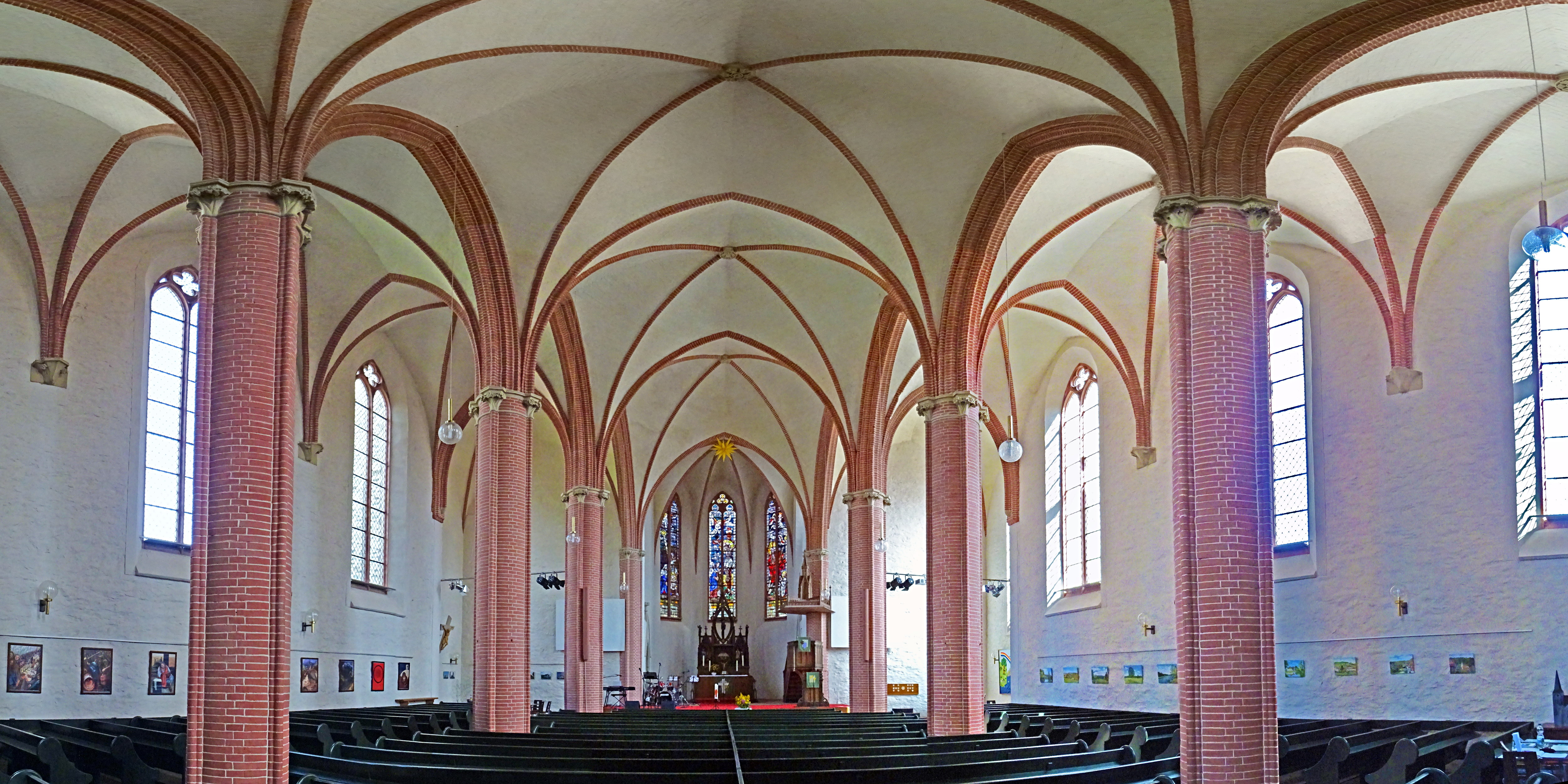 Innenraum Panorama der 1863 erbauten dreischiffigen Hallenkirche St. Jakobi (Elbingerode)